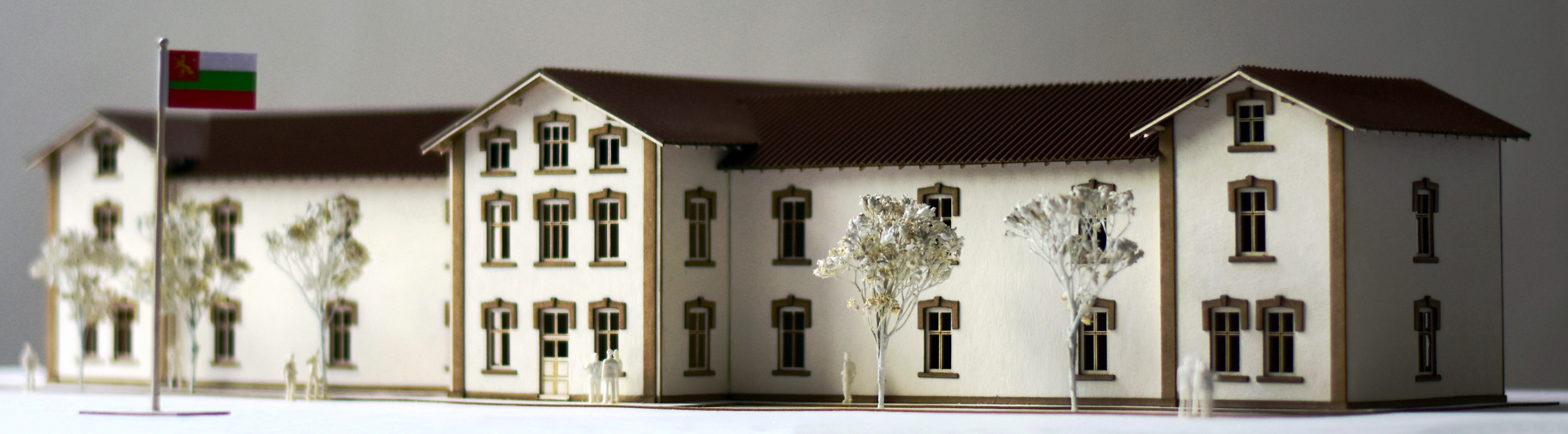 Blick auf den Paradeeingang des Hauptgebäudes der Maschinenschule der Königlichen Marine bis zum Jahre 1916. Maßstab 1: 100. Autor des Modells: Architekt Stojan Stamow.